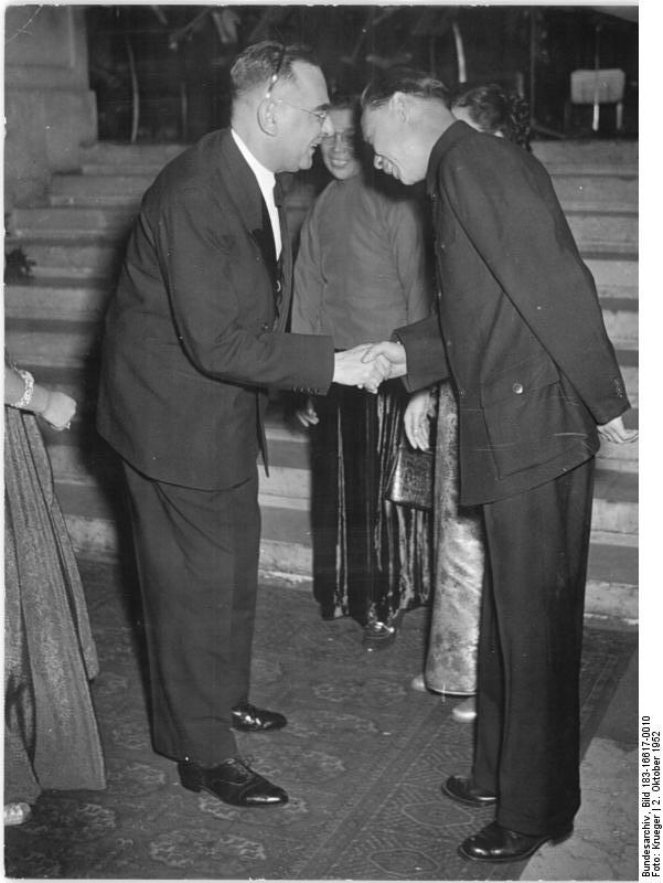 Zentralbild Krueger 2.10.1952 Empfang bei Botschafter Tschin Peng-fei. Zum 3.Jahrestag der Gründung der Volksrepublik China gab der Chef der Diplomatischen Mission der Volksrepublik China, Ausserordentlicher und Bevollmächtigter Botschafter Tschi Peng-foi, am 1.10.1952 im Haus der Ministerien zu Berlin einen Empfang. UBz: Botschafter Tschi Pong-fei (rechts) begrüsst Botschaftsrat Fürnberg (CSR).